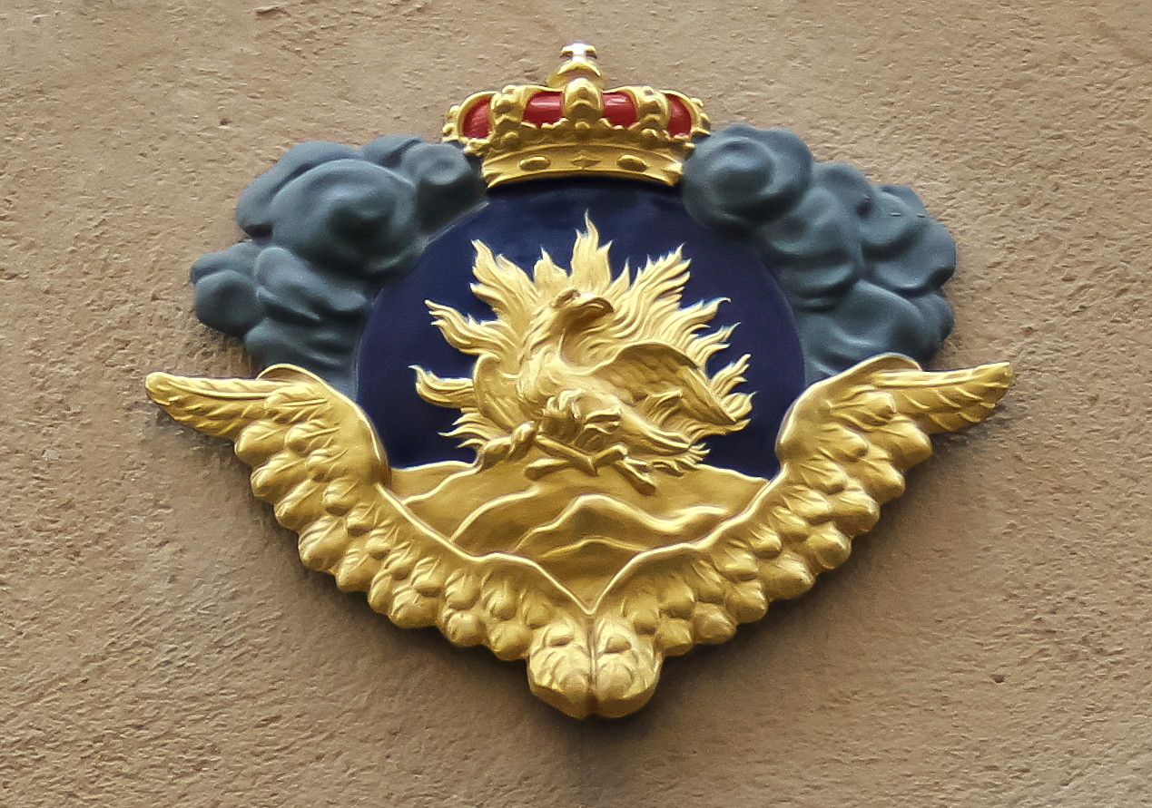 Stockholms stads brandförsäkringskontors emblem